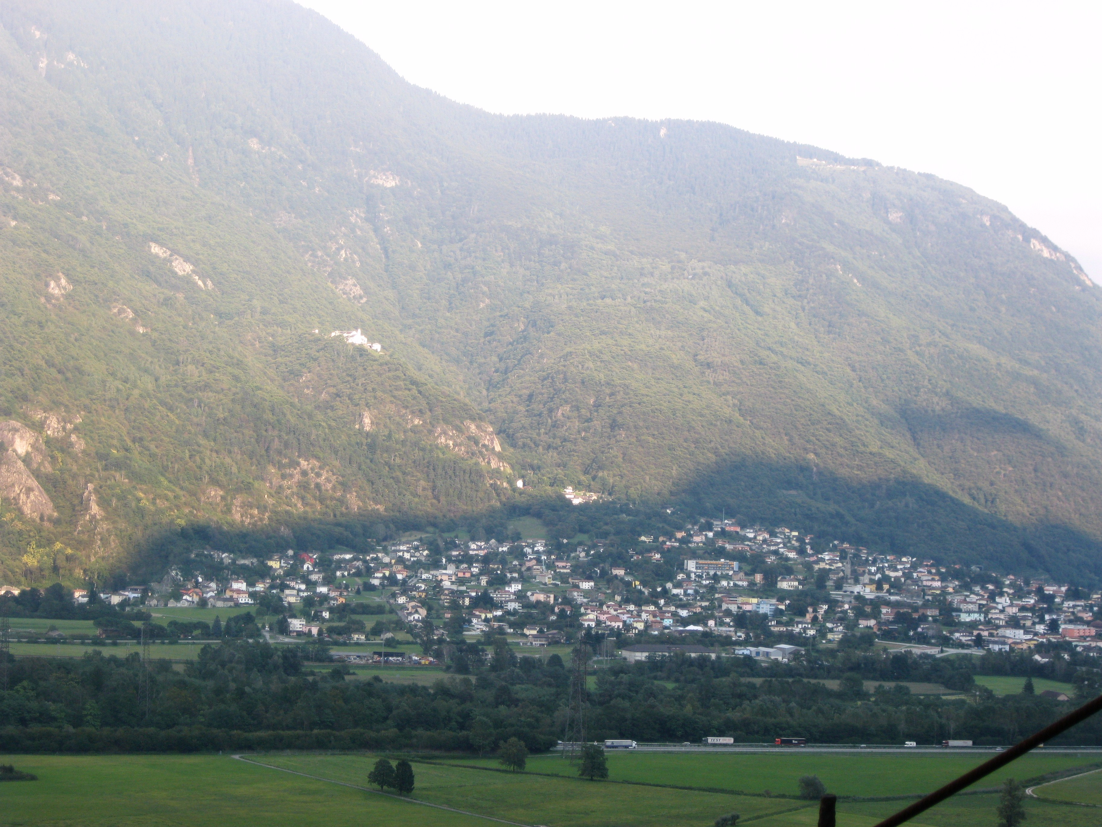 Il comune di Claro